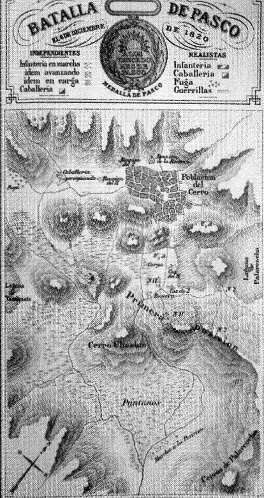 batalla entre independientes vs realistas